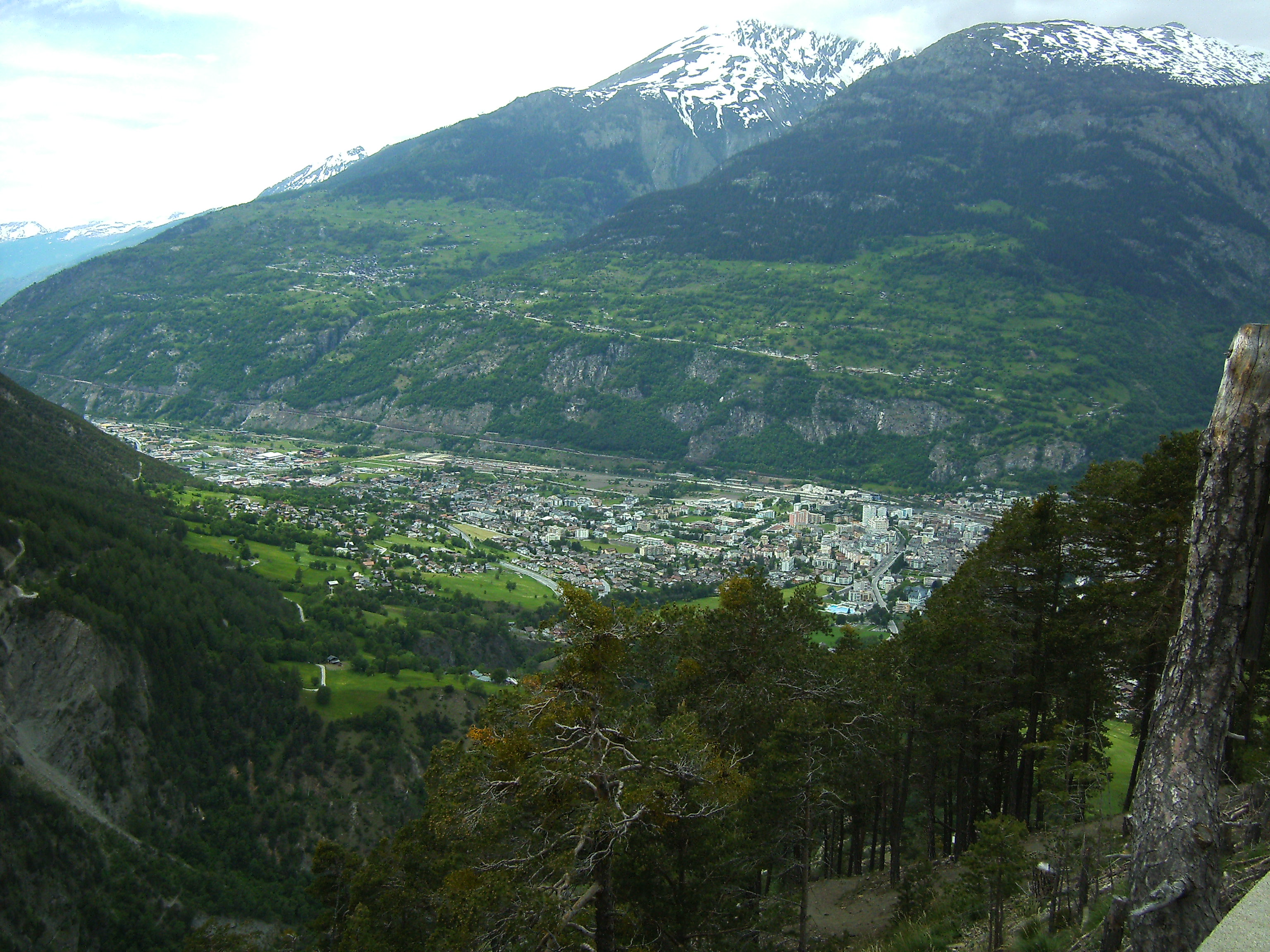 Blick auf Brig im Oberwallis, Rhonetal vom Stockalperweg aus aufgenommen.